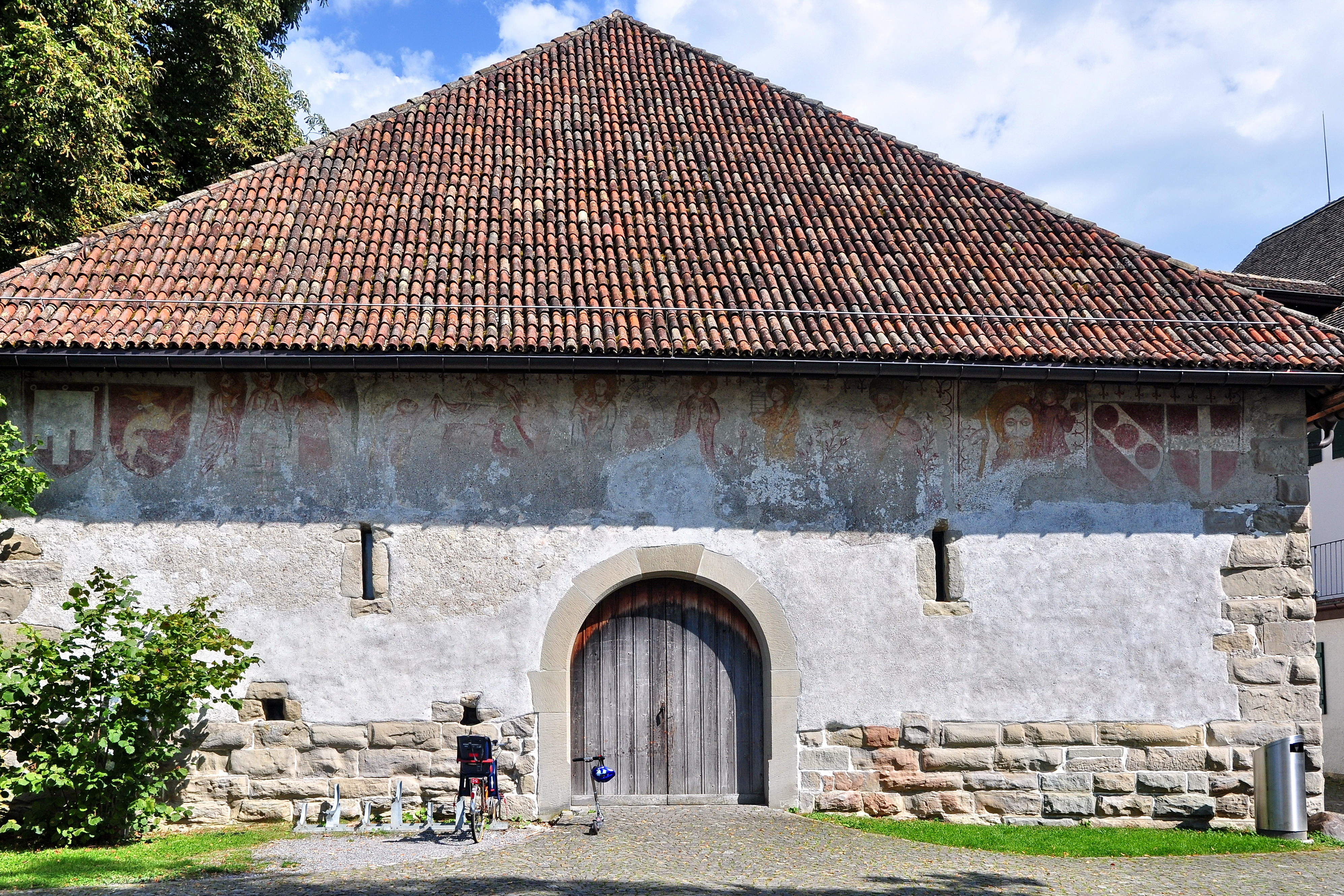 Zehntentrotte, Theodor-Brunner-Weg 4 in Küsnacht (Switzerland)